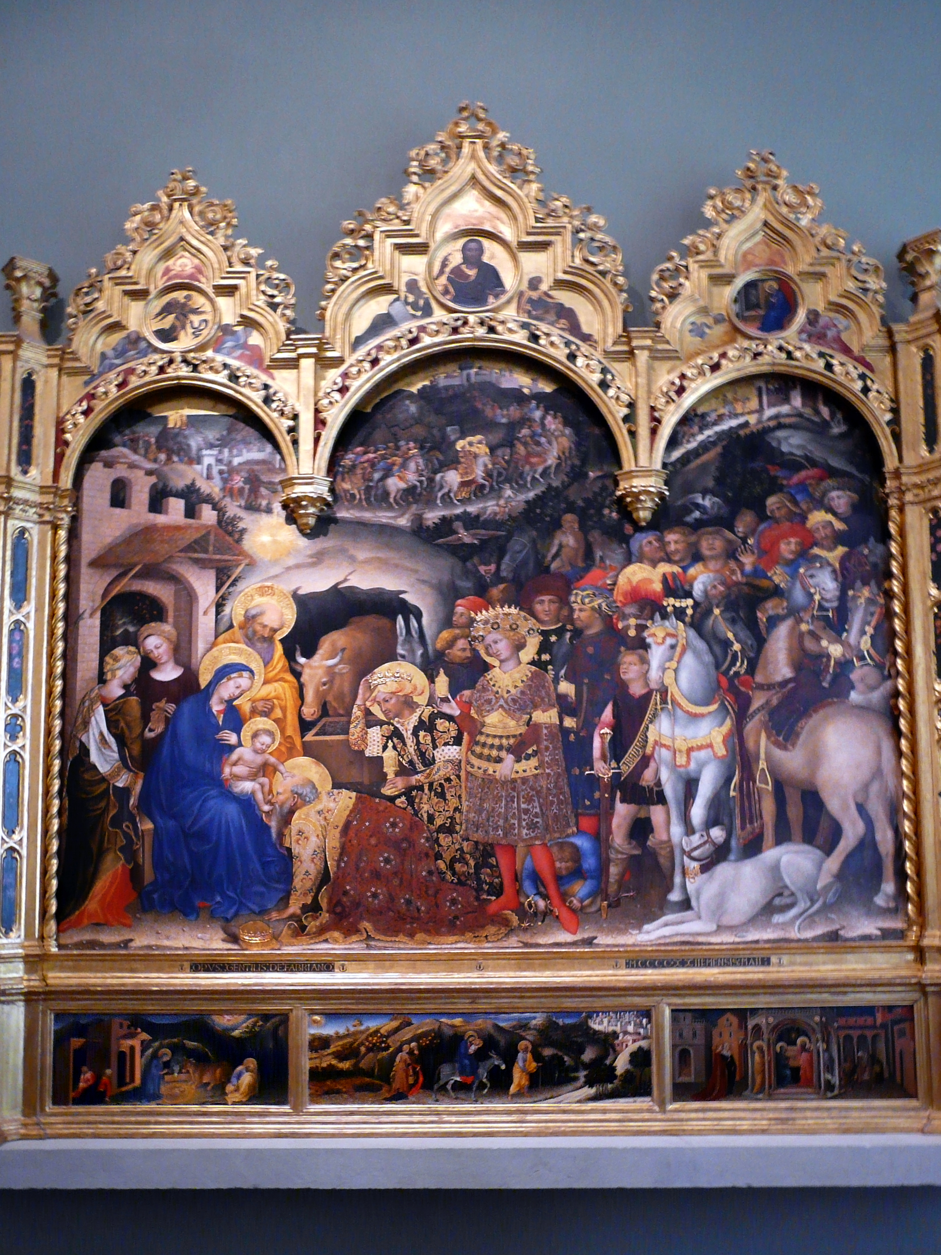 Джентиле да Фабриано. Поклонение волхвов.